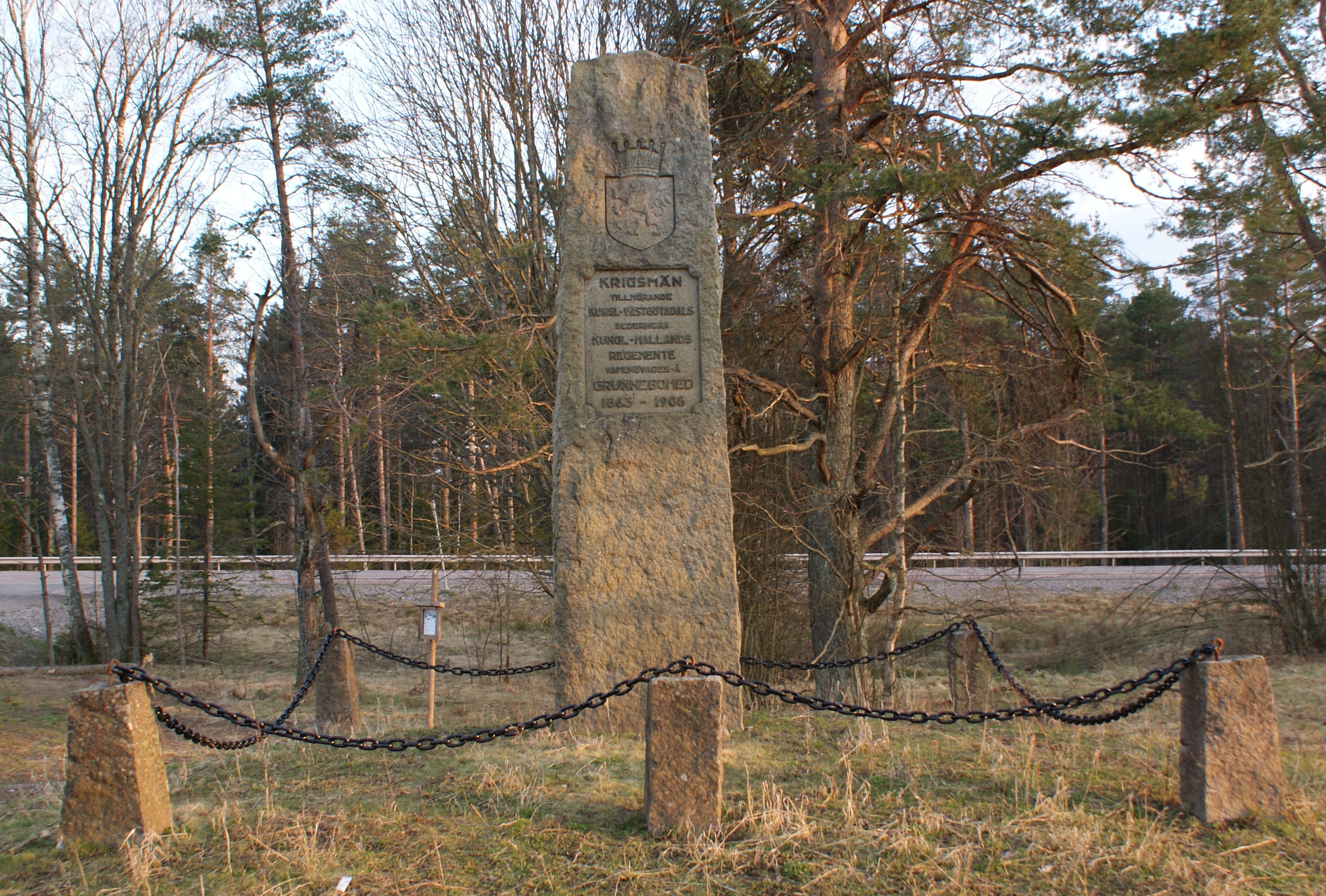 Minnessten vid Grunnebohed